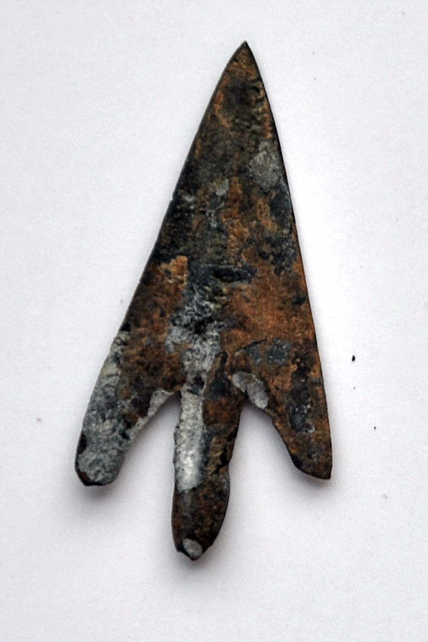 Fundstelle der Inselsiedlung (17. Jahrhundert v.Chr.) im Obersee im Bereich Technikum–Holzbrücke in Rapperswil (Switzerland) : Das Fundspektrum umfasst u.a. Keramik und Gewandnadeln, Dolche, Pfeilspitzen und Angelhaken aus Bronze sowie eine Gussform aus Speckstein für Rasiermesser vom alpinen Typ. Einige Bronzeobjekte sind Nachgüsse aus der bei der Siedlung geborgenen Gussform.